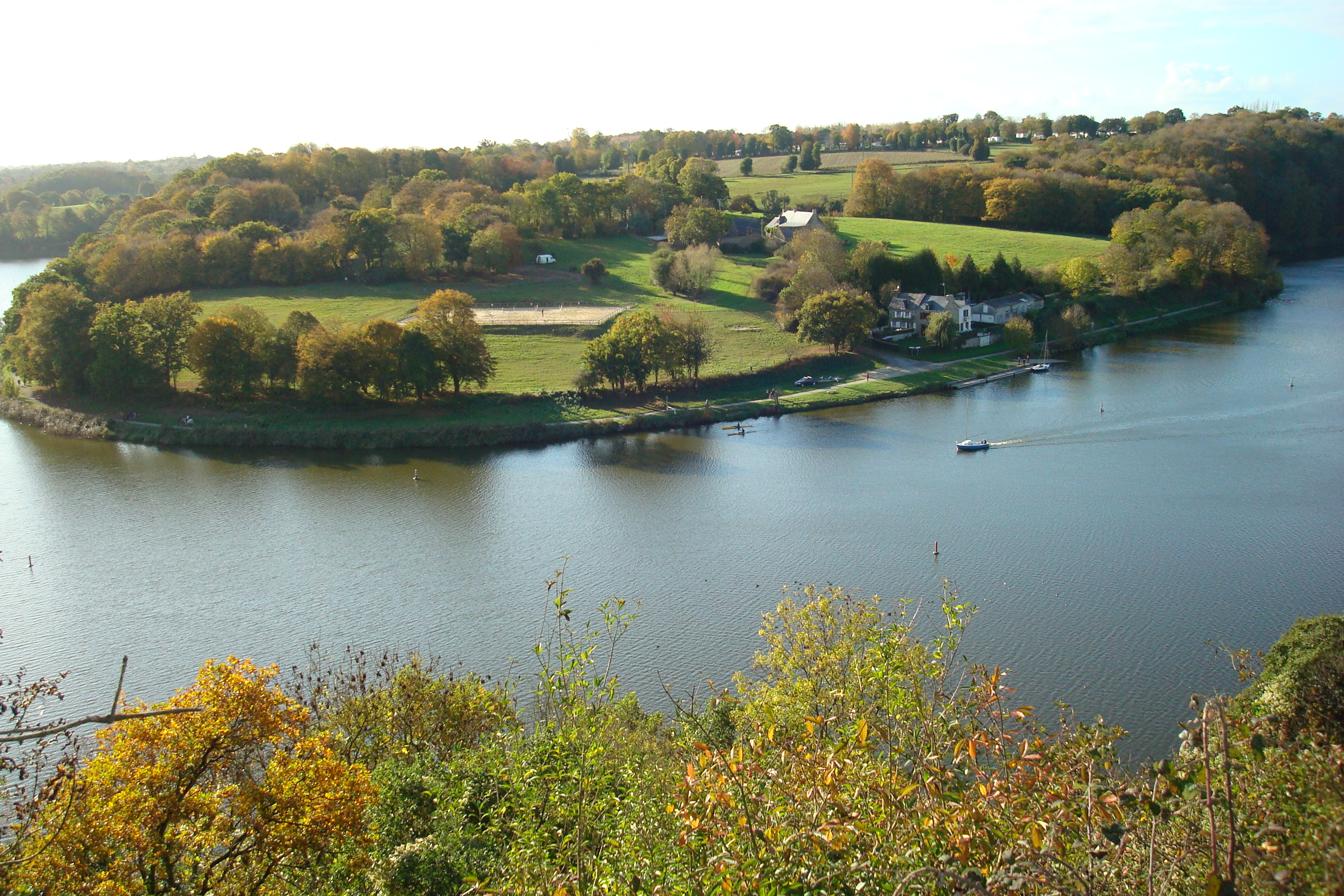 Panorama sur la Rance vu des hauteurs de la Vicomté